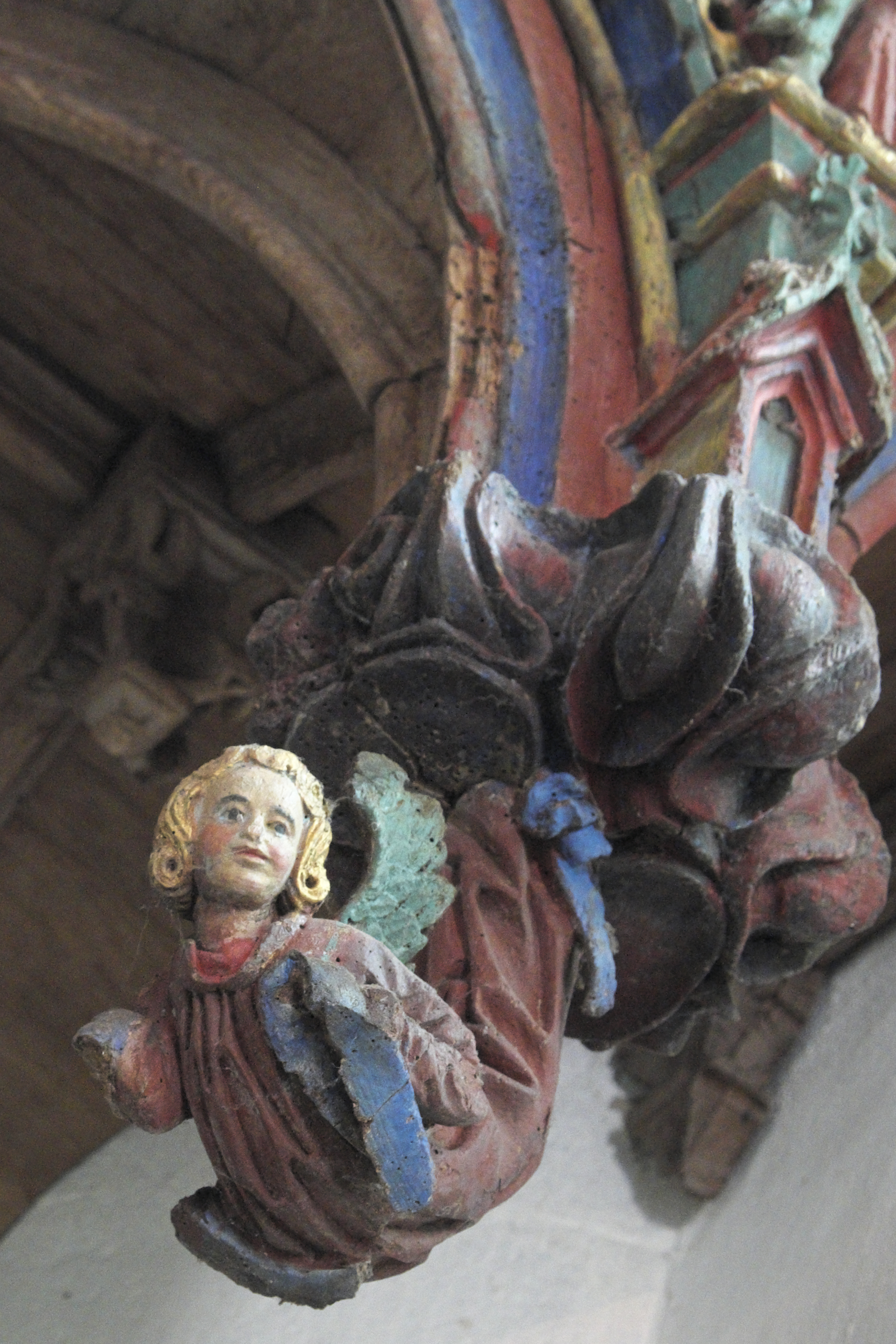 Kapelle Saint-Fiacre in Le Faouët im Département Morbihan (Region Bretagne/Frankreich), Lettner